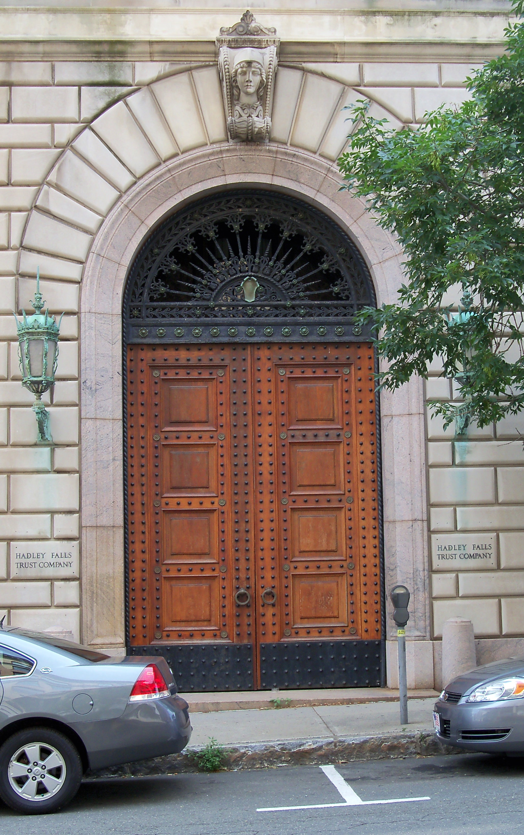 Door